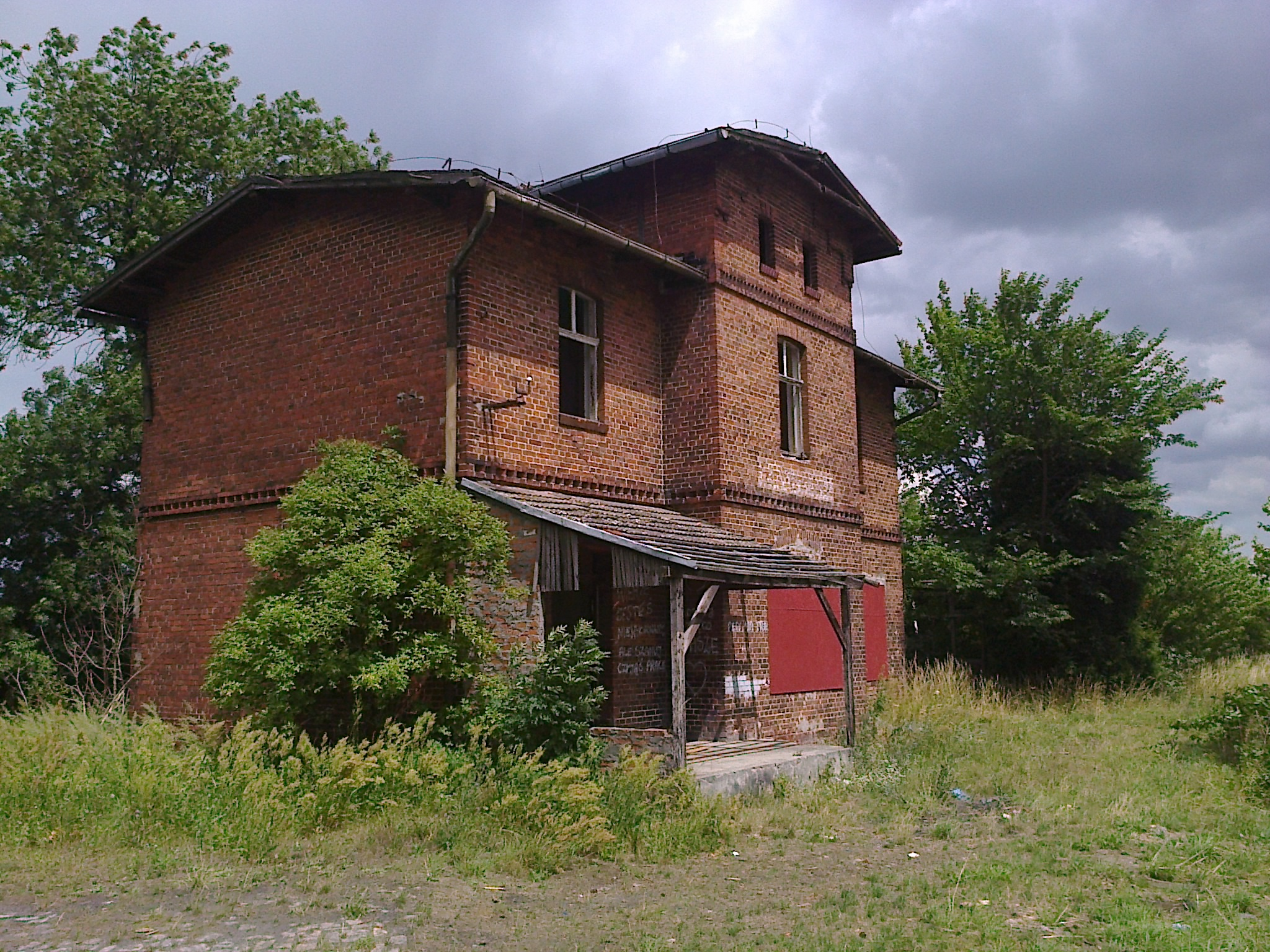 Nieczynna stacja kolejowa w Strzeleczkach